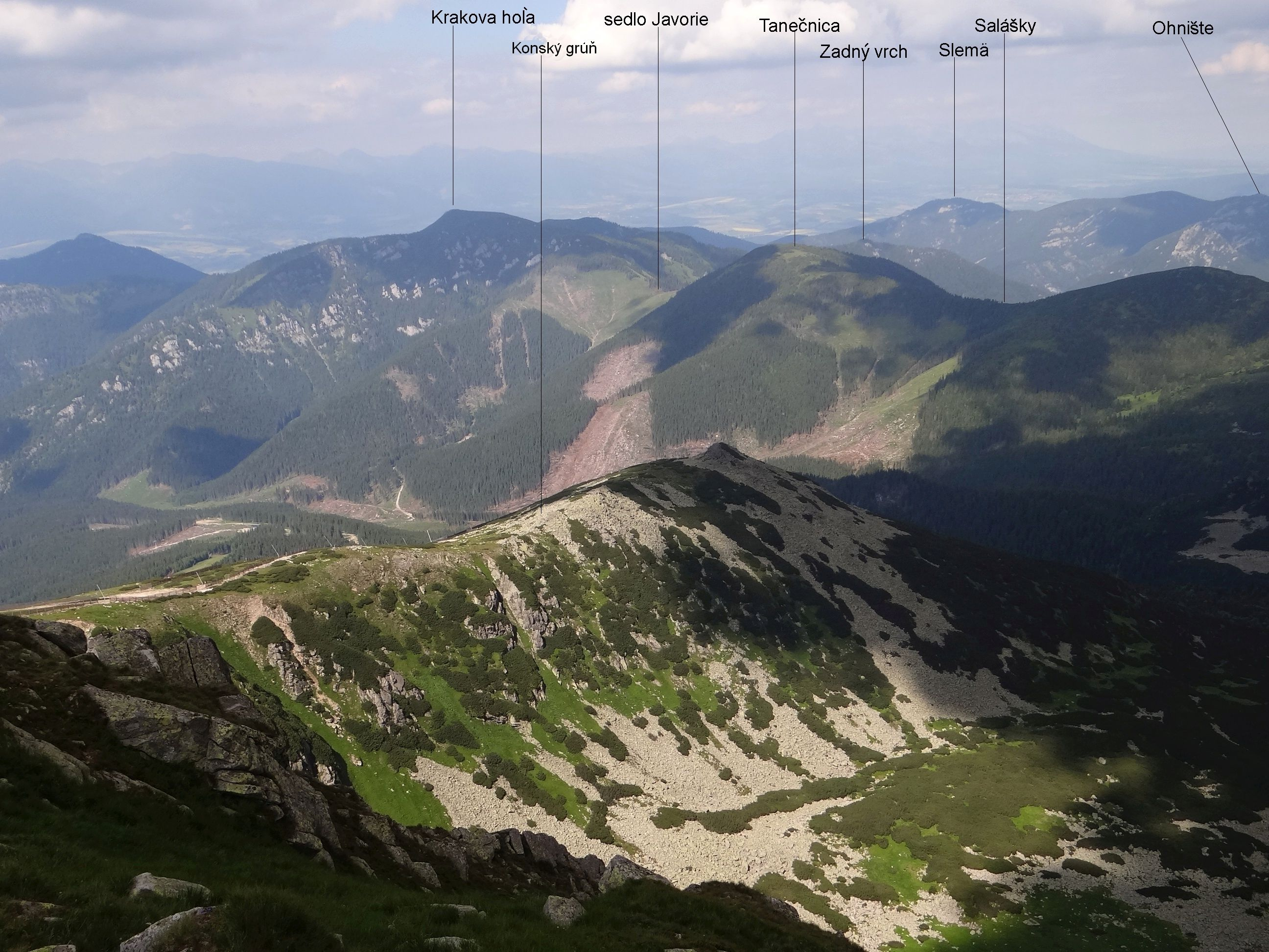 View from Chopok